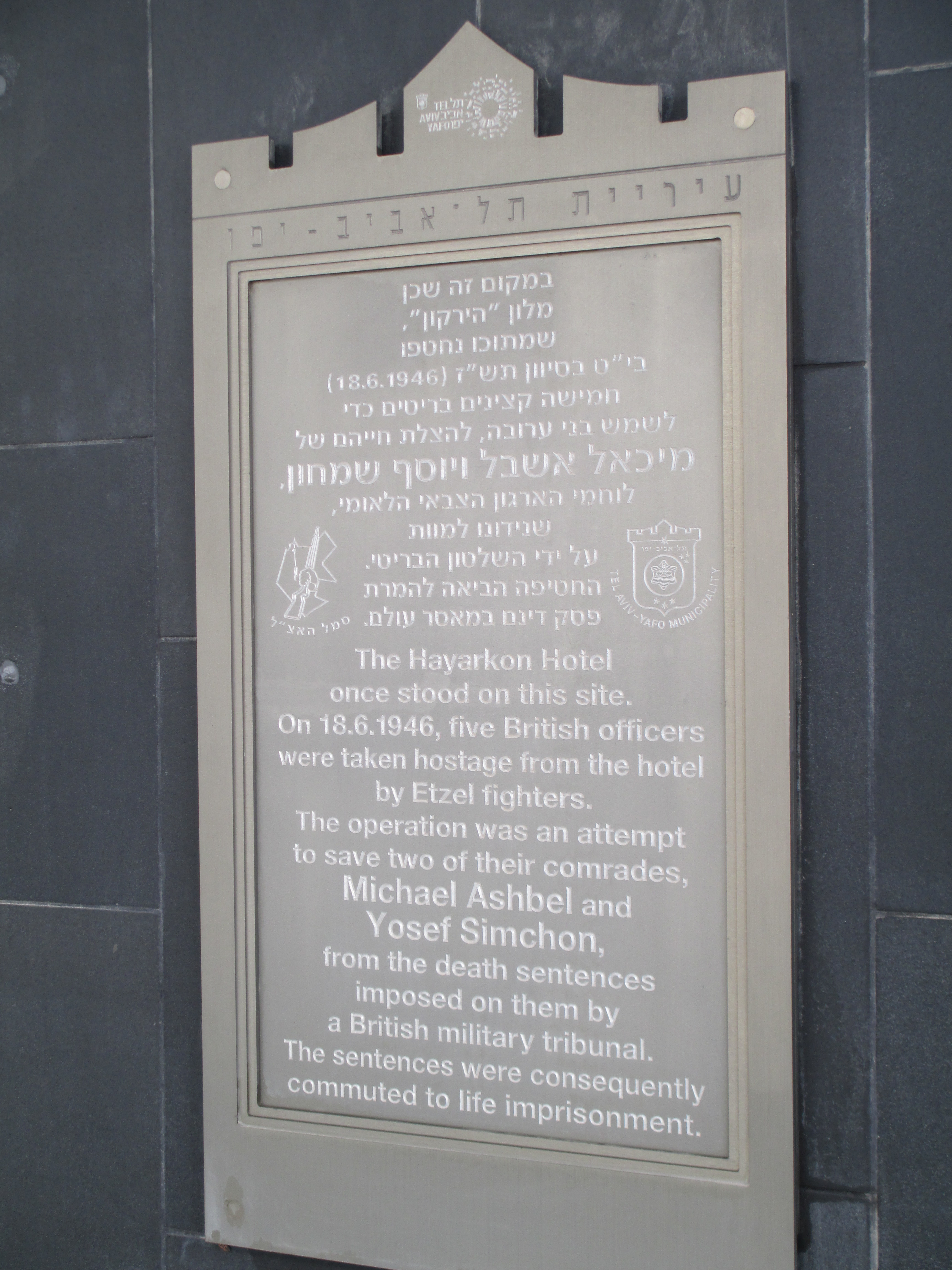 לוחית זיכרון של האצ"ל במקום בו נחטפו חמישה קצינים בריטים במלון "הירקון" בתל רביב, רח' הירקון 64